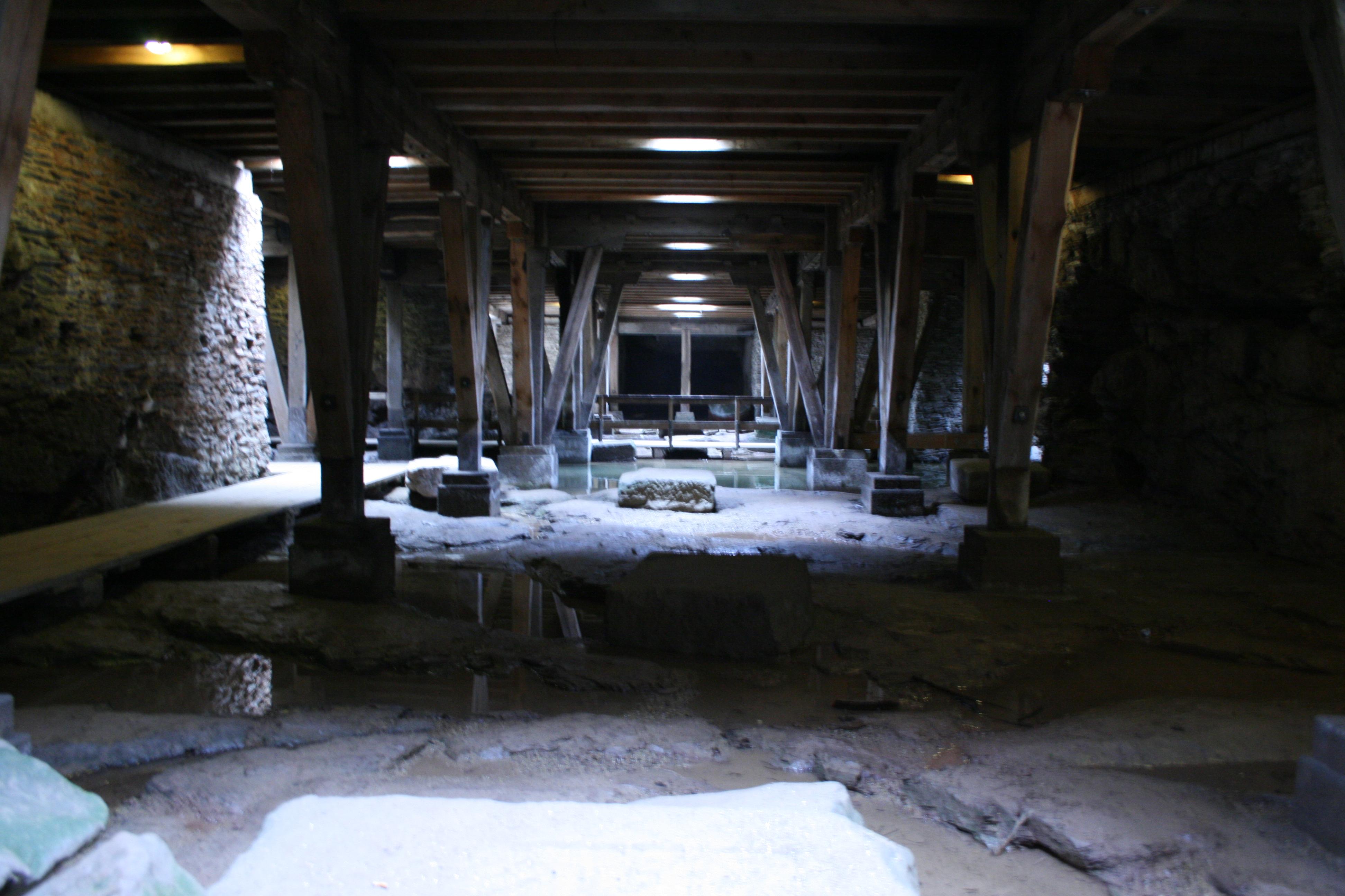 Gänge (fossae) unterhalb der Arena des Trierer Amphitheaters.